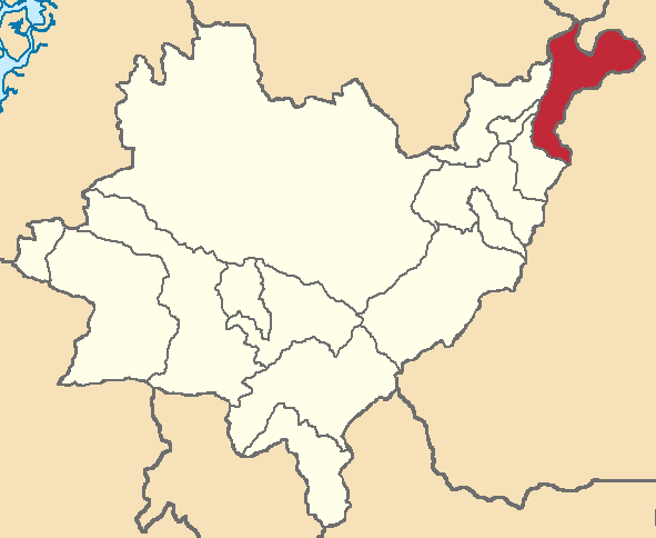 Mapa localizacor del cantón en Azuay, Ecuador